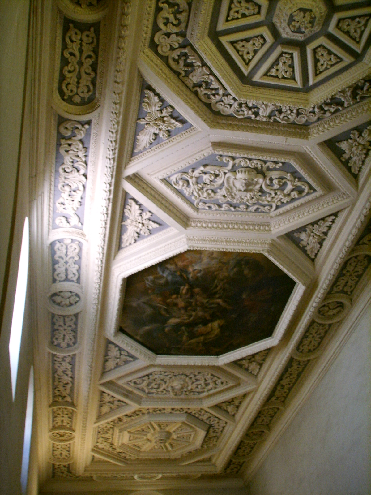 San jacopo tra i fossi, soffitto